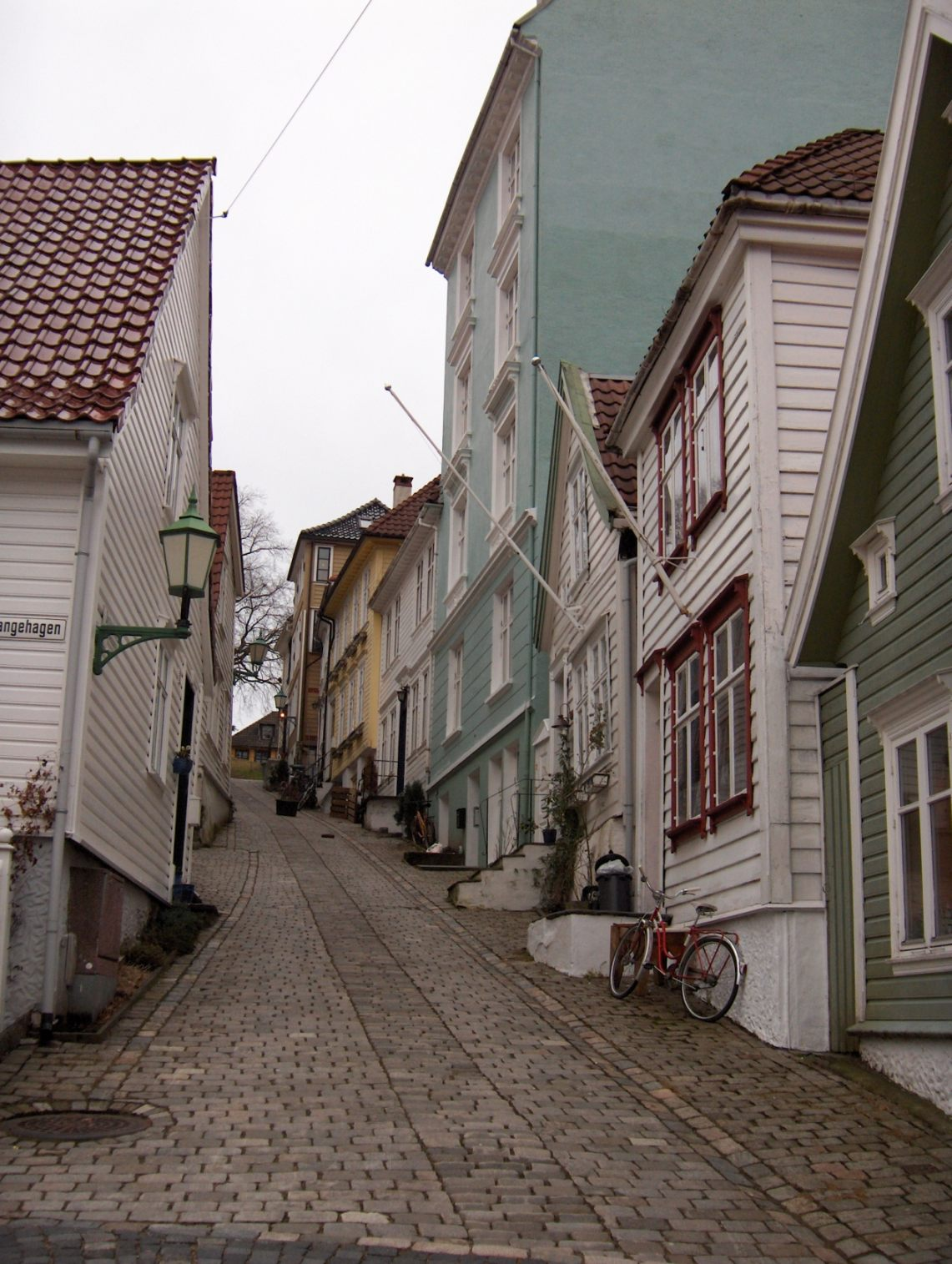 Strangehagen dans le quartier de Nøstet à Bergen. Own work. February 2006. Saty 9 novembre 2006 à 01:52 (CET)